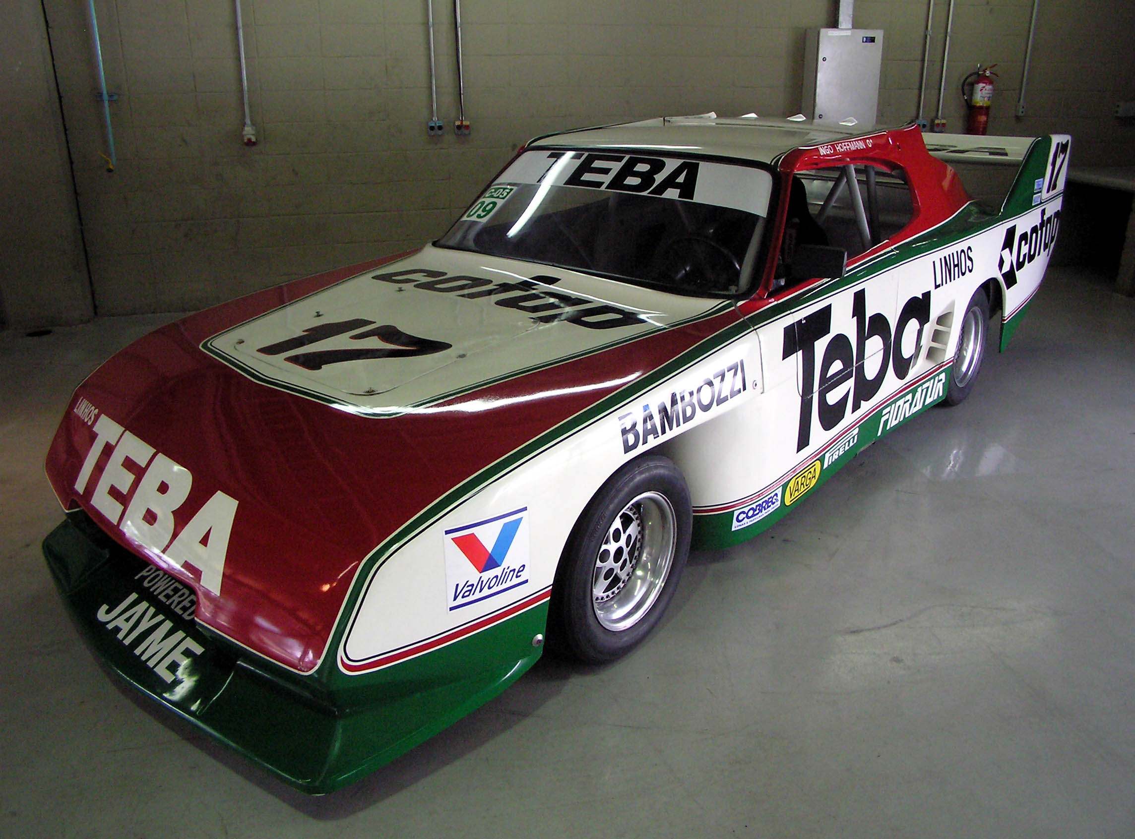 Stock Car Brasil: Ingo Hoffmann's Chevrolet Opala in 1988. Owner: Museu do Automobilismo Brasileiro